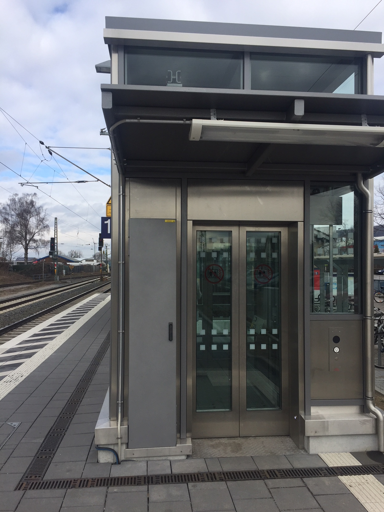 Der Aufzug zu Gleis 2 und zur Unterführung.